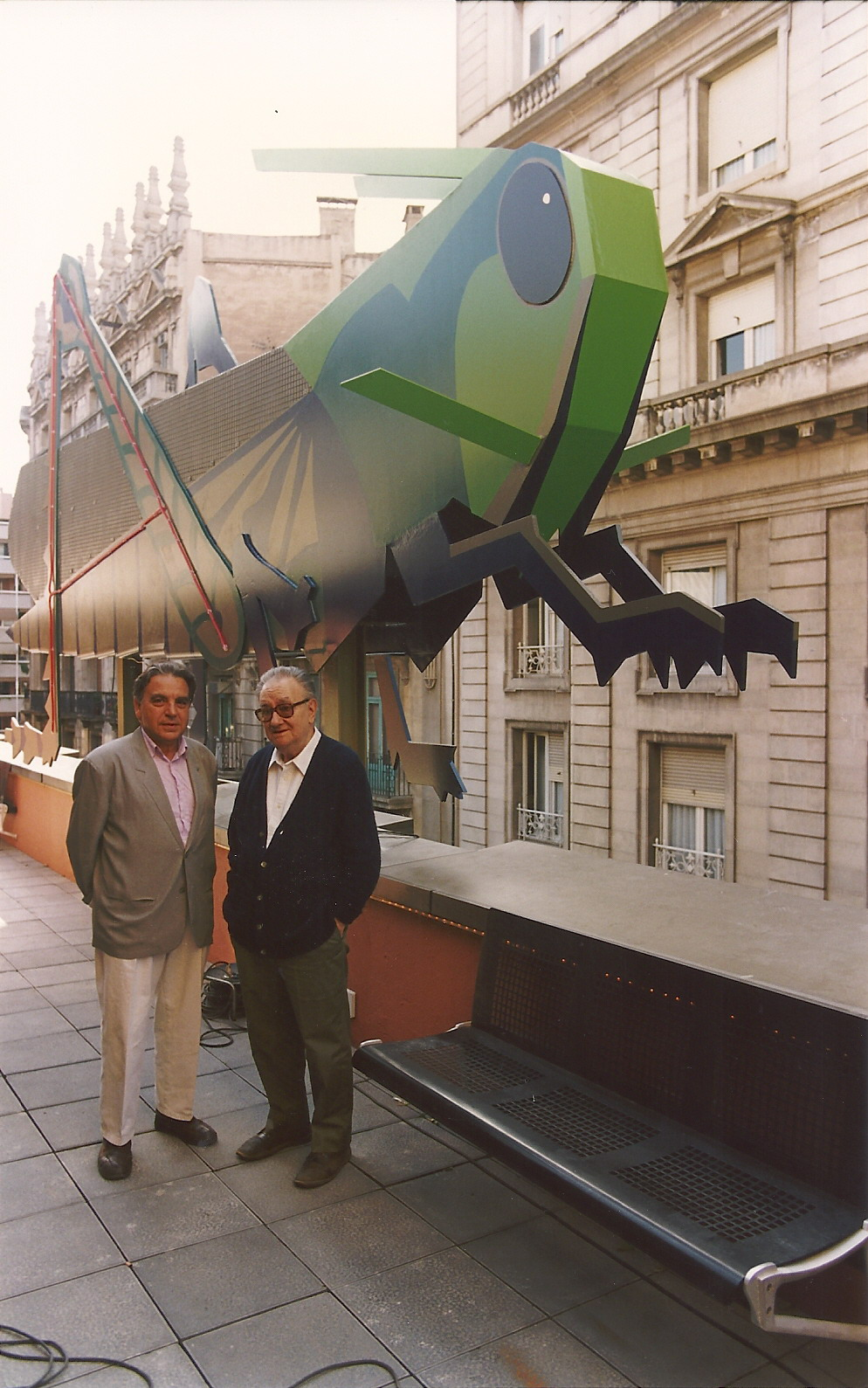 El saltamontes, Sede del Colegio de Aparejadores y Arquitectos Técnicos de Barcelona, calle Bon Pastor, Barcelona. (1993) Ideado por Joan Brossa i plasmado por el artista i diseñador Josep Pla-Narbona.